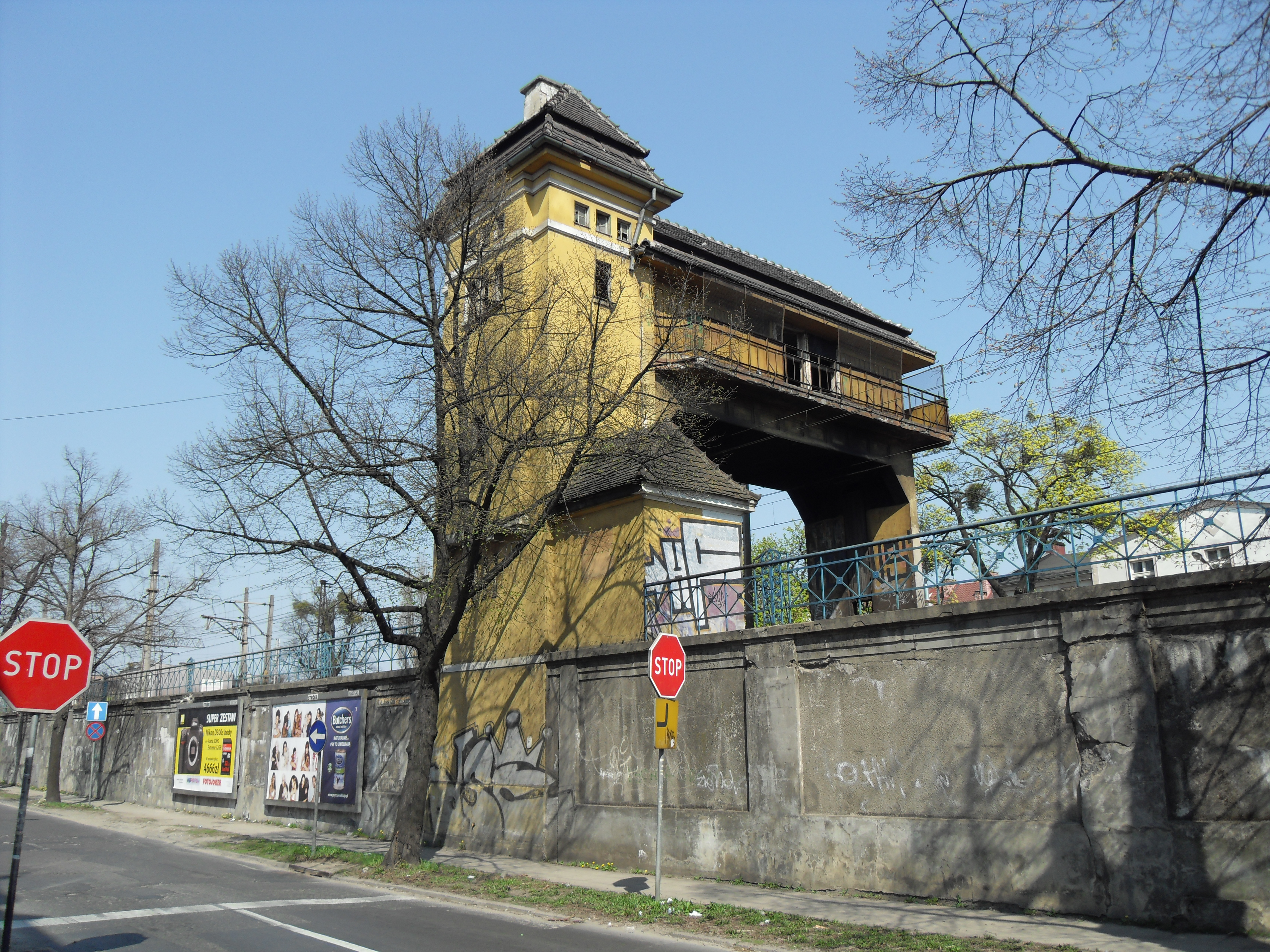 Gdańsk Wrzeszcz, nastawnia bramowa z pocz. XX wieku